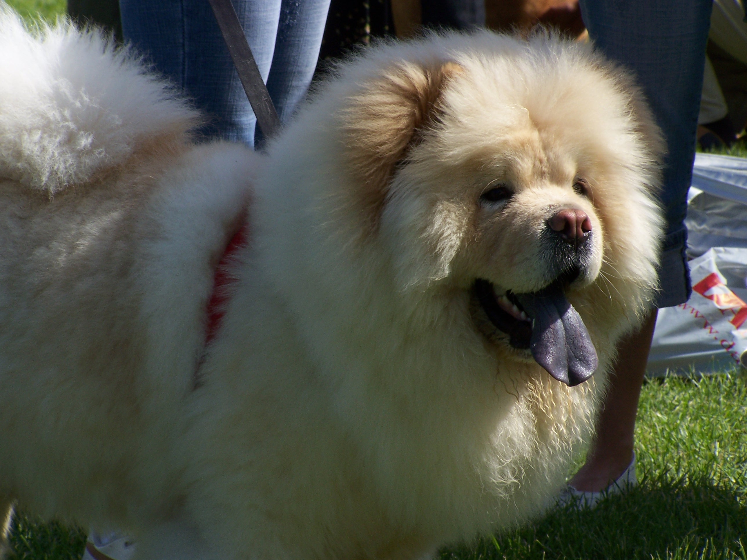 Międzynarodowa Wystawa Psów Rasowych, Szczecin 2007